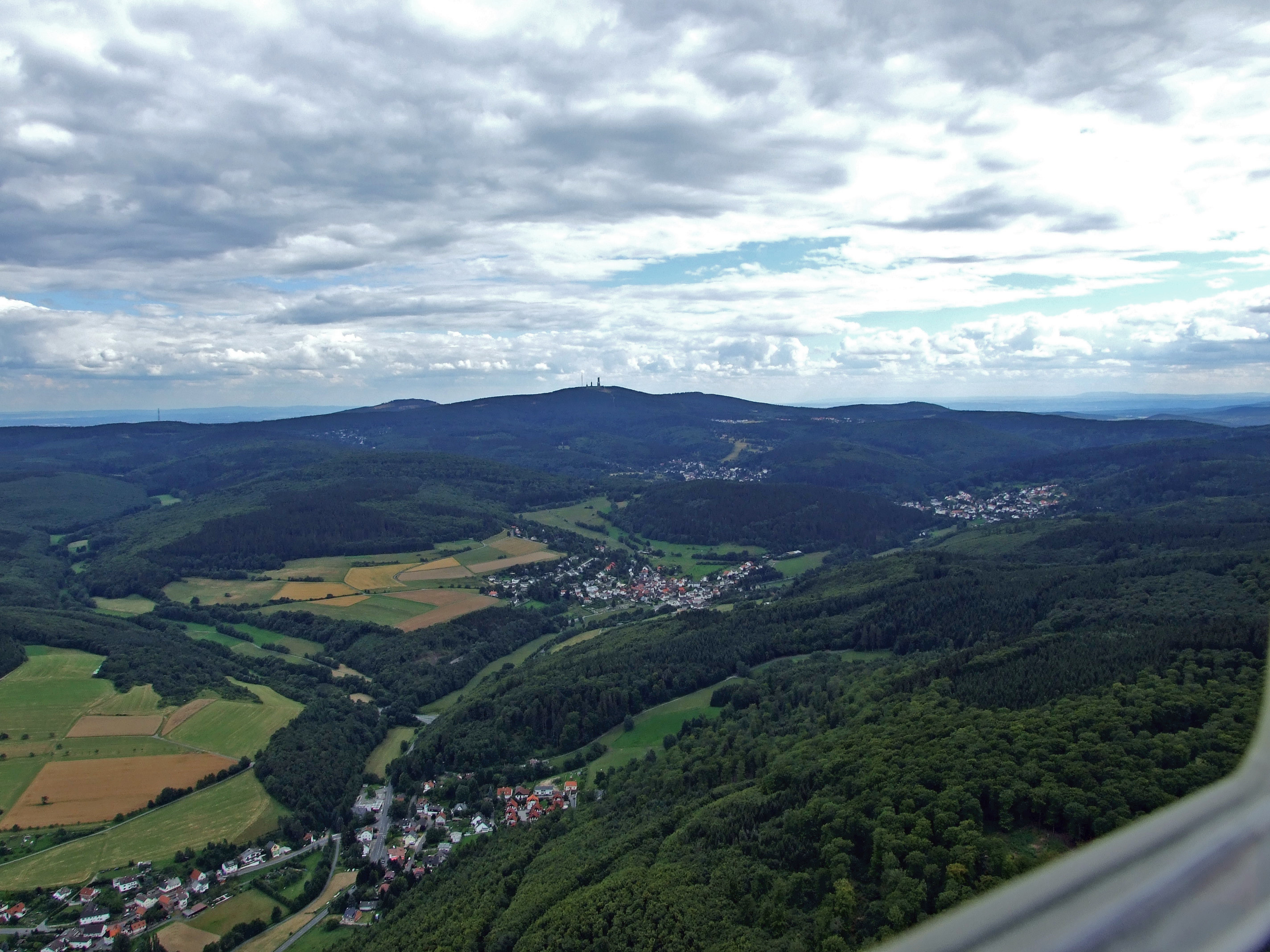 Blick von Nord auf die drei höchsten Erhebungen des Taunus: Grosser Feldberg, kl. Feldberg und Altkönig (im Hintergrund). Im Vordergrund die Ortschaft Brombach (Gemeinde Schmitten) im Weiltal.